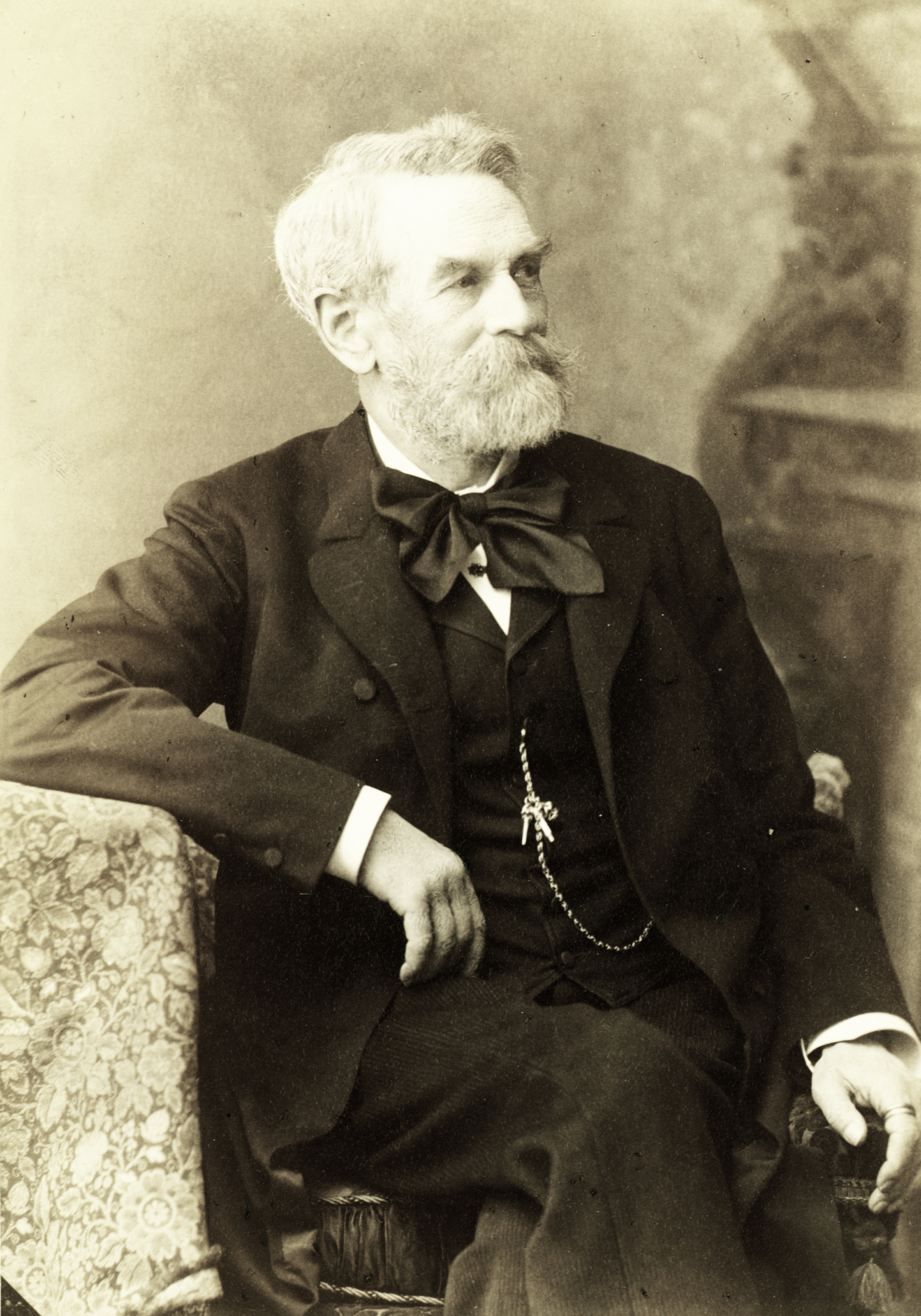 Pilisi Neÿ Ferenc (Pest, 1814. május 26. – Budapest, 1889. szeptember 11.) hírlapíró, színműíró, a pesti belvárosi reáliskola igazgatója, a Magyar Tudományos Akadémia levelező tagja. A felvétel 1880 körül készült.